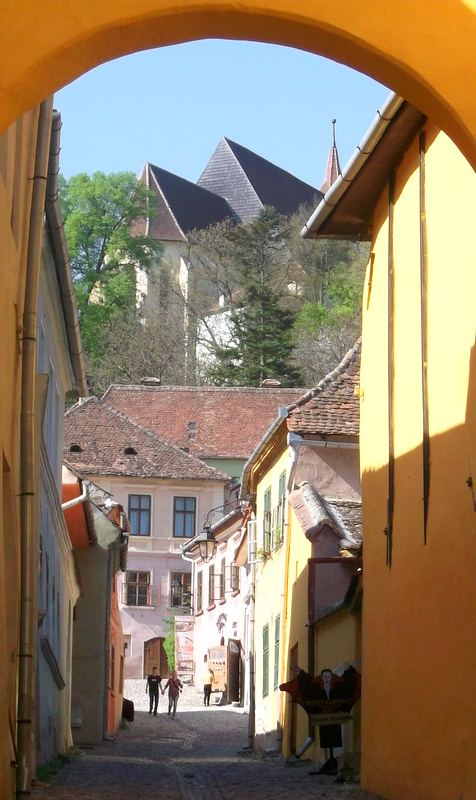 Rumunia, SighişoaraRomână: Romania, Sighișoara